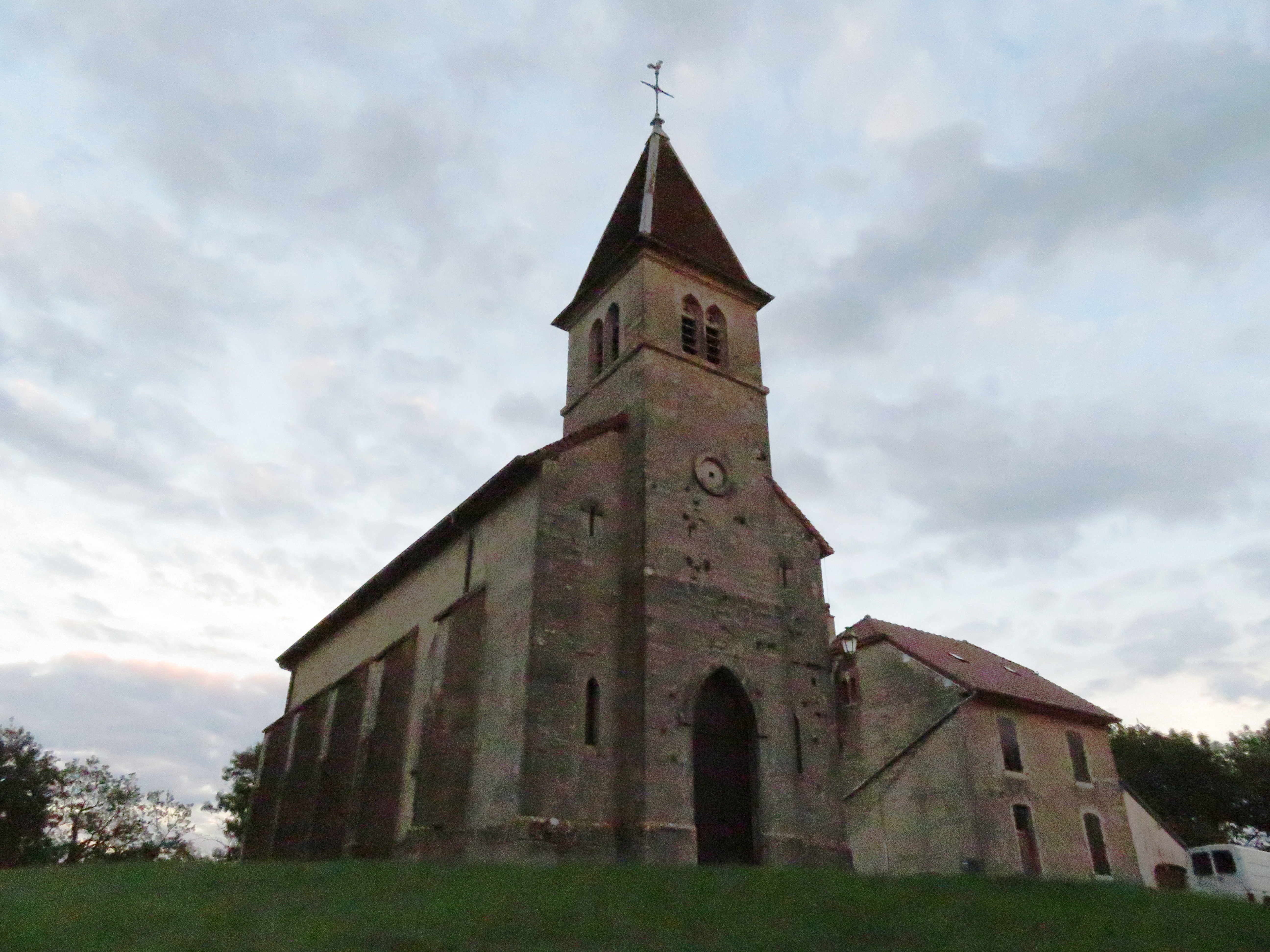 Vue de côté de l’église de Moutonne (Jura).